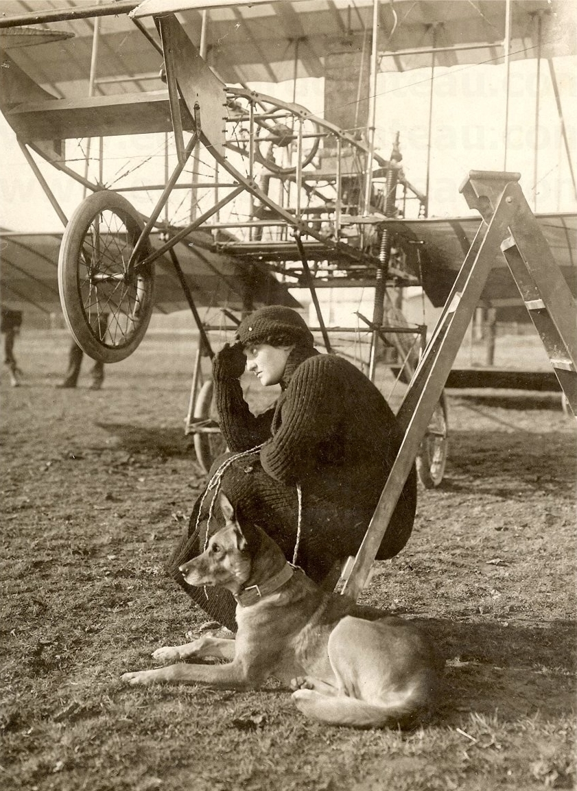 Obtient le premier brevet de pilote féminin le 17 mars 1910. Ici au pied de son Voisin en 1909. Première élève d'Edouard Chateau à Mourmelon.